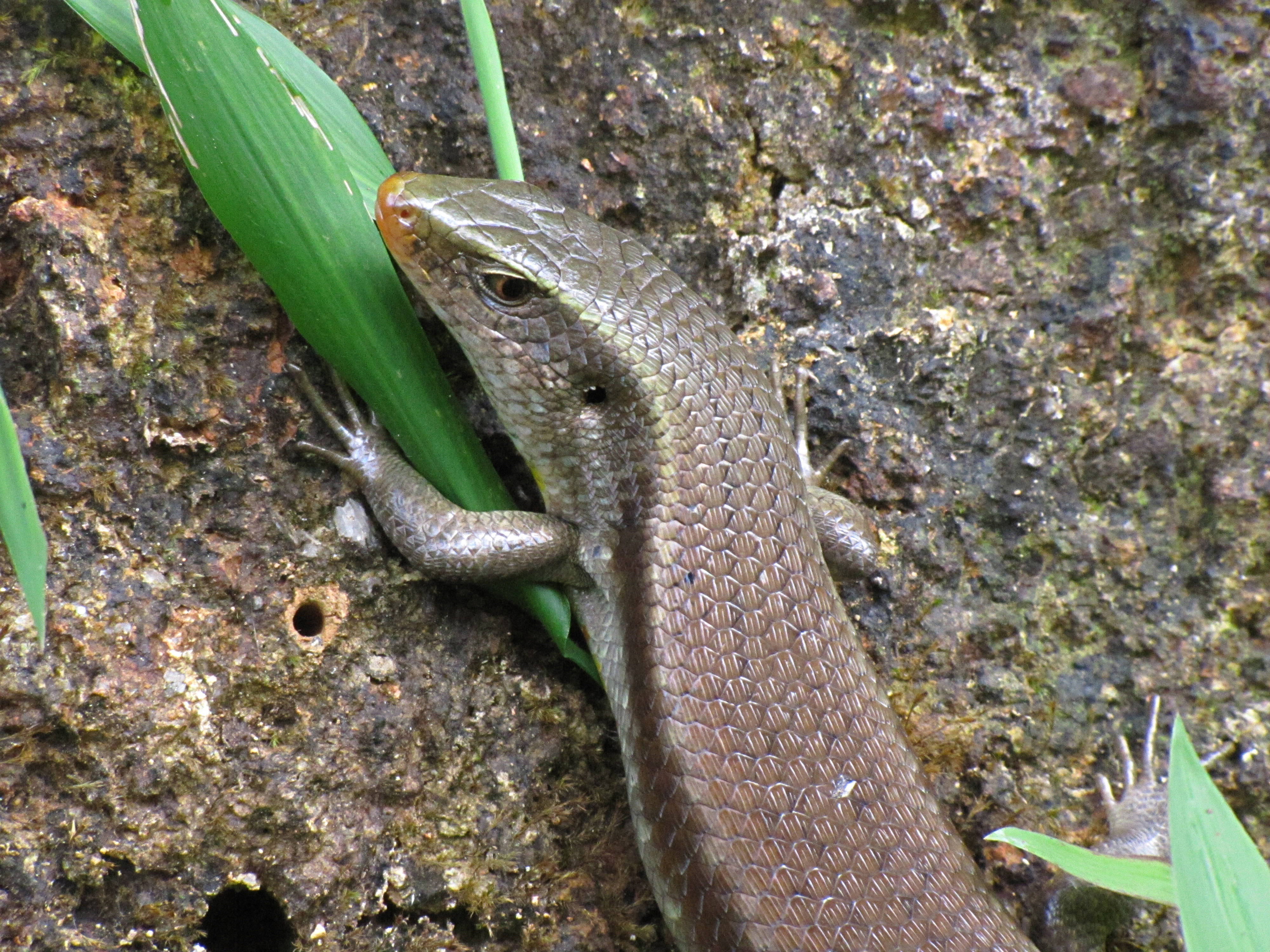 Viviparous lizard from Kanhangad, Kasargod, Kerala, India